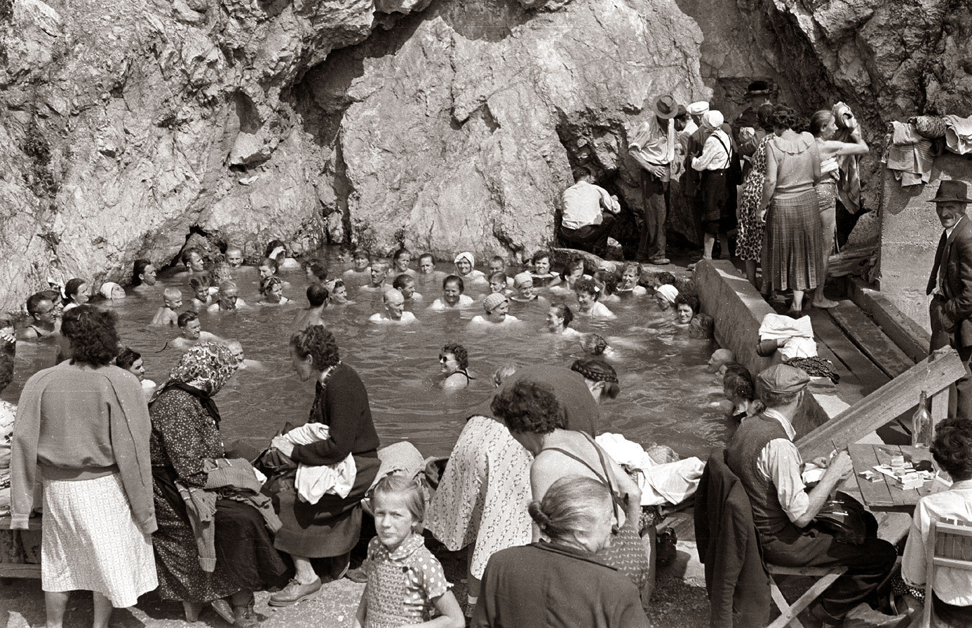 Atomske toplice v Podčetrtku.